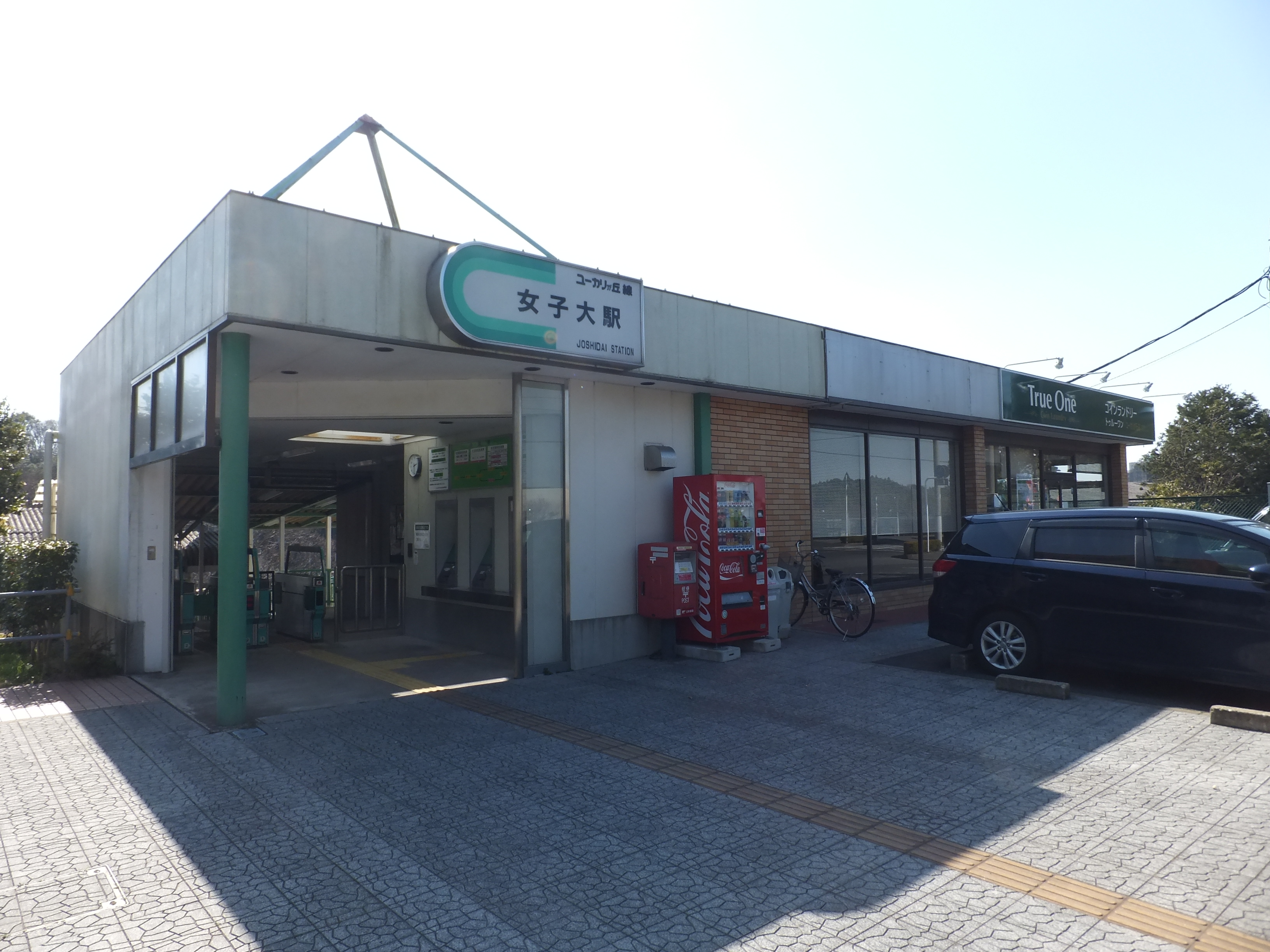 山万ユーカリが丘線女子大駅駅舎。